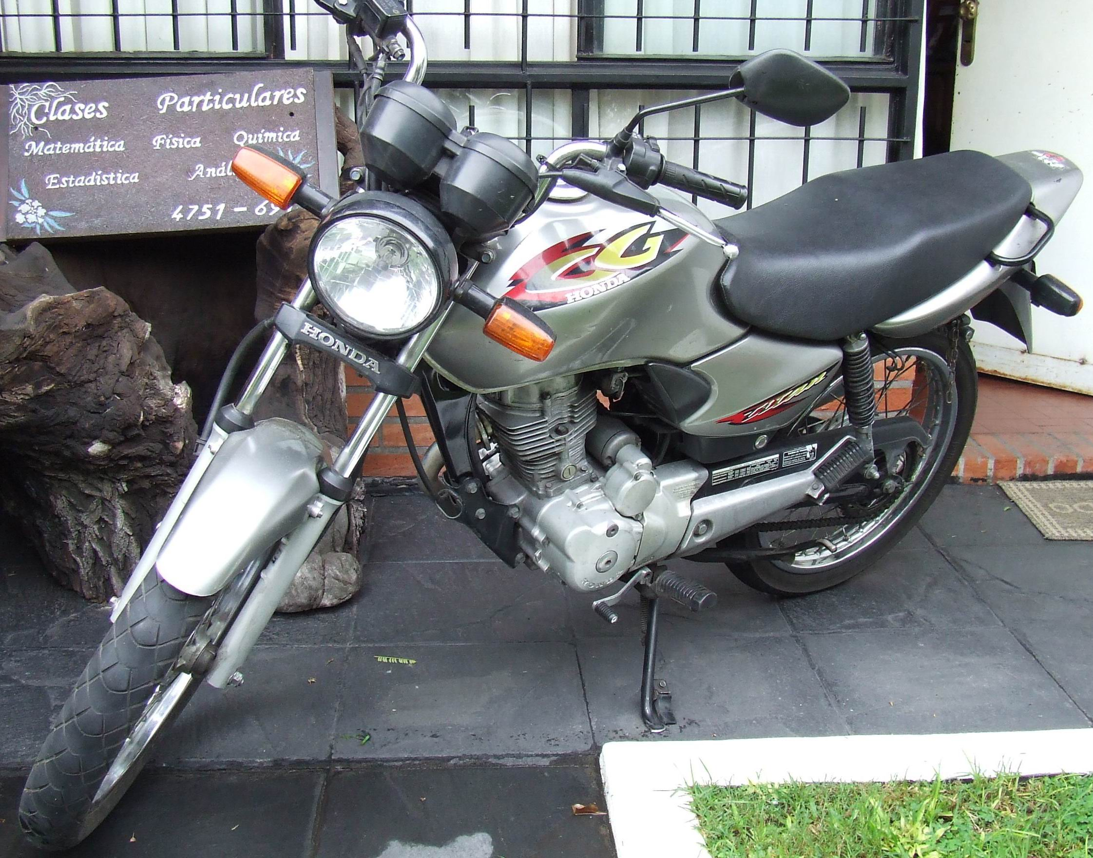 Honda CG Titán 125